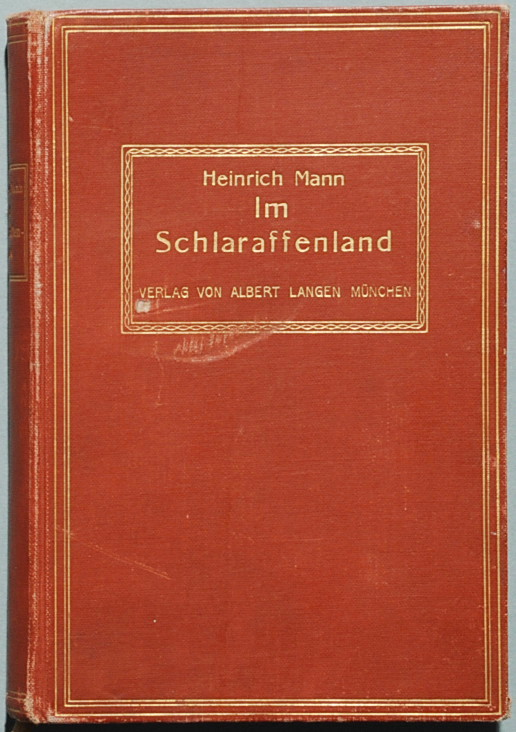 Mann, Heinrich. Im Schlaraffenland. Ein Roman unter feinen Leuten. München: A. Langen 1900, 494 Seiten. Erstdruck (Wilpert/Gühring² 5)